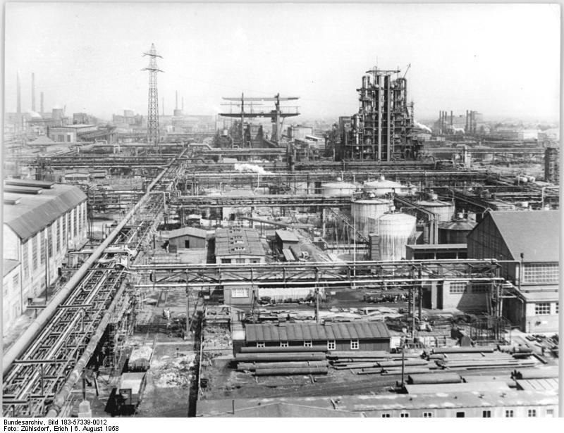 ADN-ZB-Zühlsdorf-Schmidt 6.8.1958 Frö-Schm Veb Leuna-Werke U.B.z: Blick auf das Leuna-Werk.